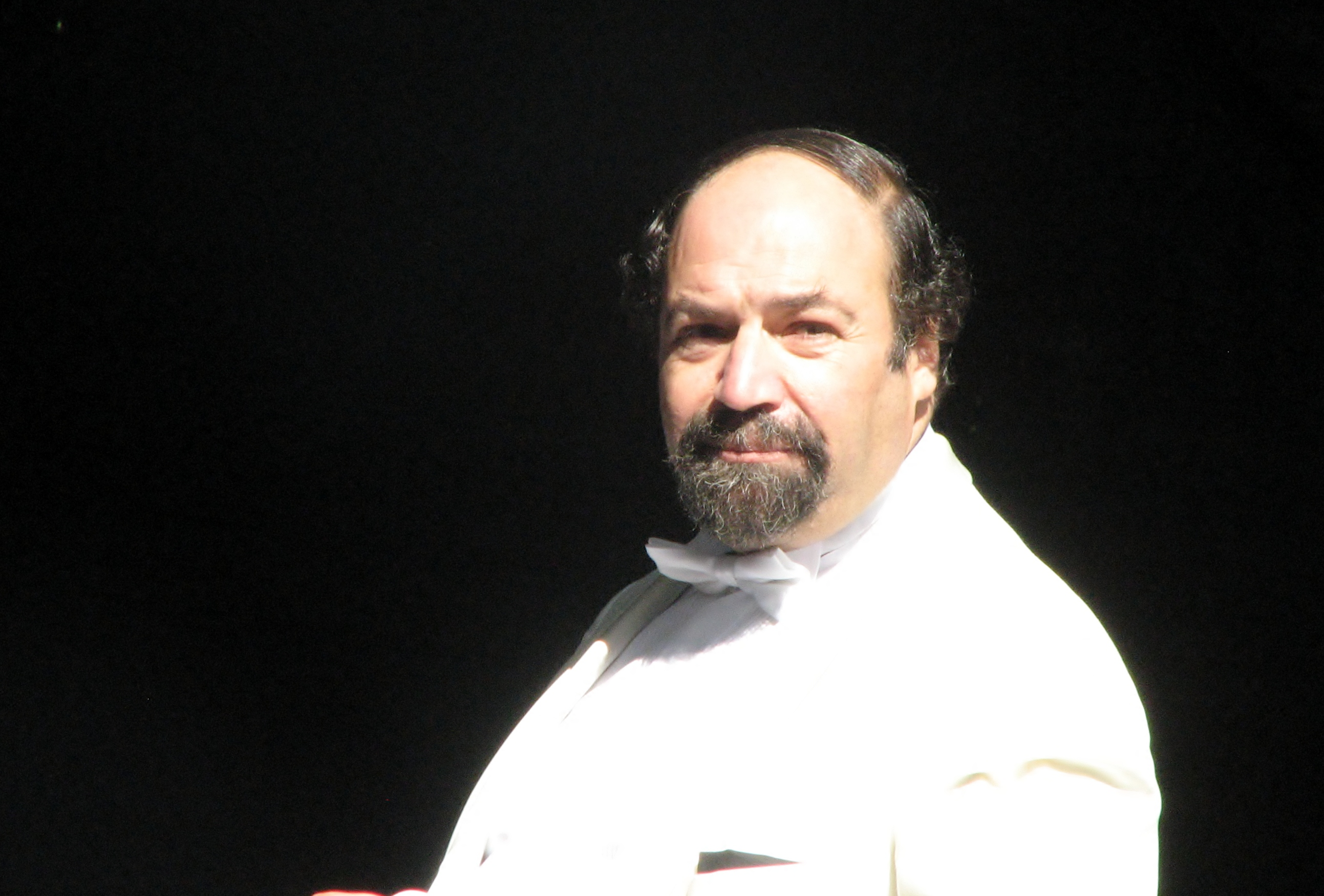 Jüri Alperten Rahvusooper Estonia 107. hooaja avamisel